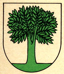 Wappen von Coffrane Kanton Neuenburg Schweiz